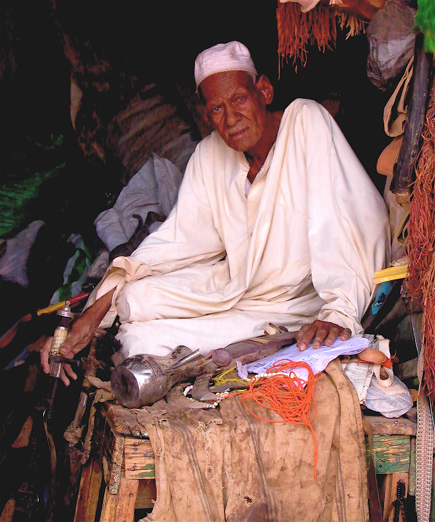 Khartoum, Sudan